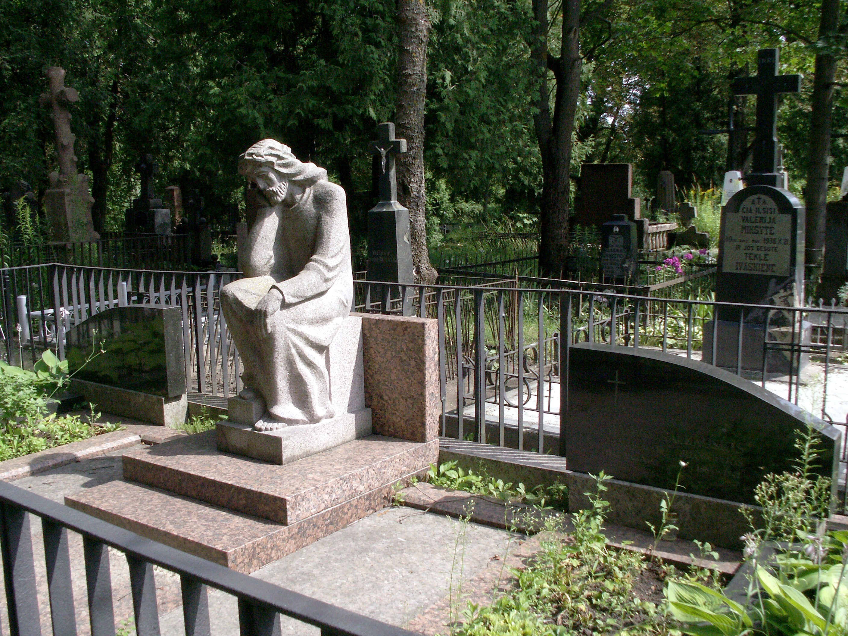 Šiaulių senosios kapinės. Prof. Stasio Šalkauskio ir šeimos kapas.